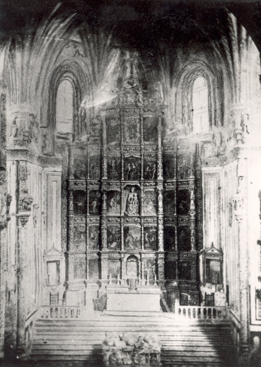 Retablo mayor del monasterio de san Francisco de Cuéllar (Segovia), actualmente desaparecido. Tomada a principios del siglo XX